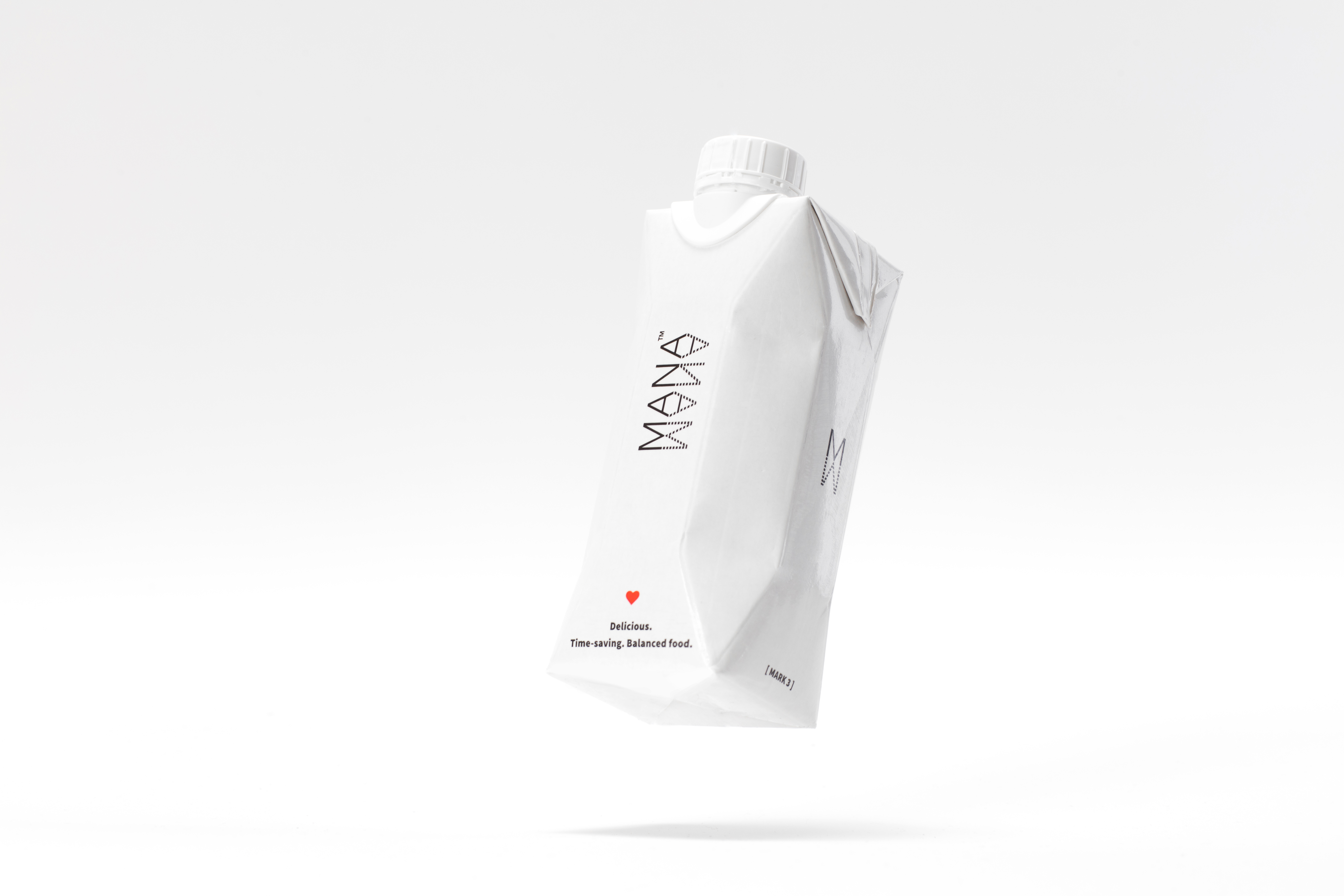 Jeden z produktů: MANA Drink. Lahodné, vyvážené jídlo ve formě nápoje.